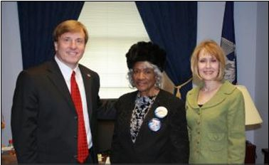 John Fleming & Mrs. Fleming